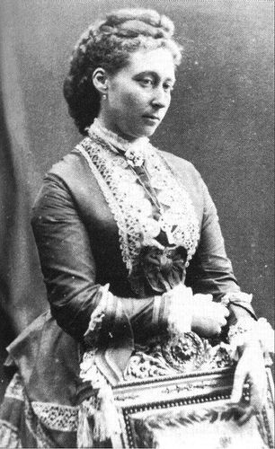 Princesa Alice do Reino Unido, filha da Rainha Vitória do Reino Unido, casada com Luís IV, Grão-duque de Hesse e mãe da Imperatriz Alexandra Feodorovna da Rússia.